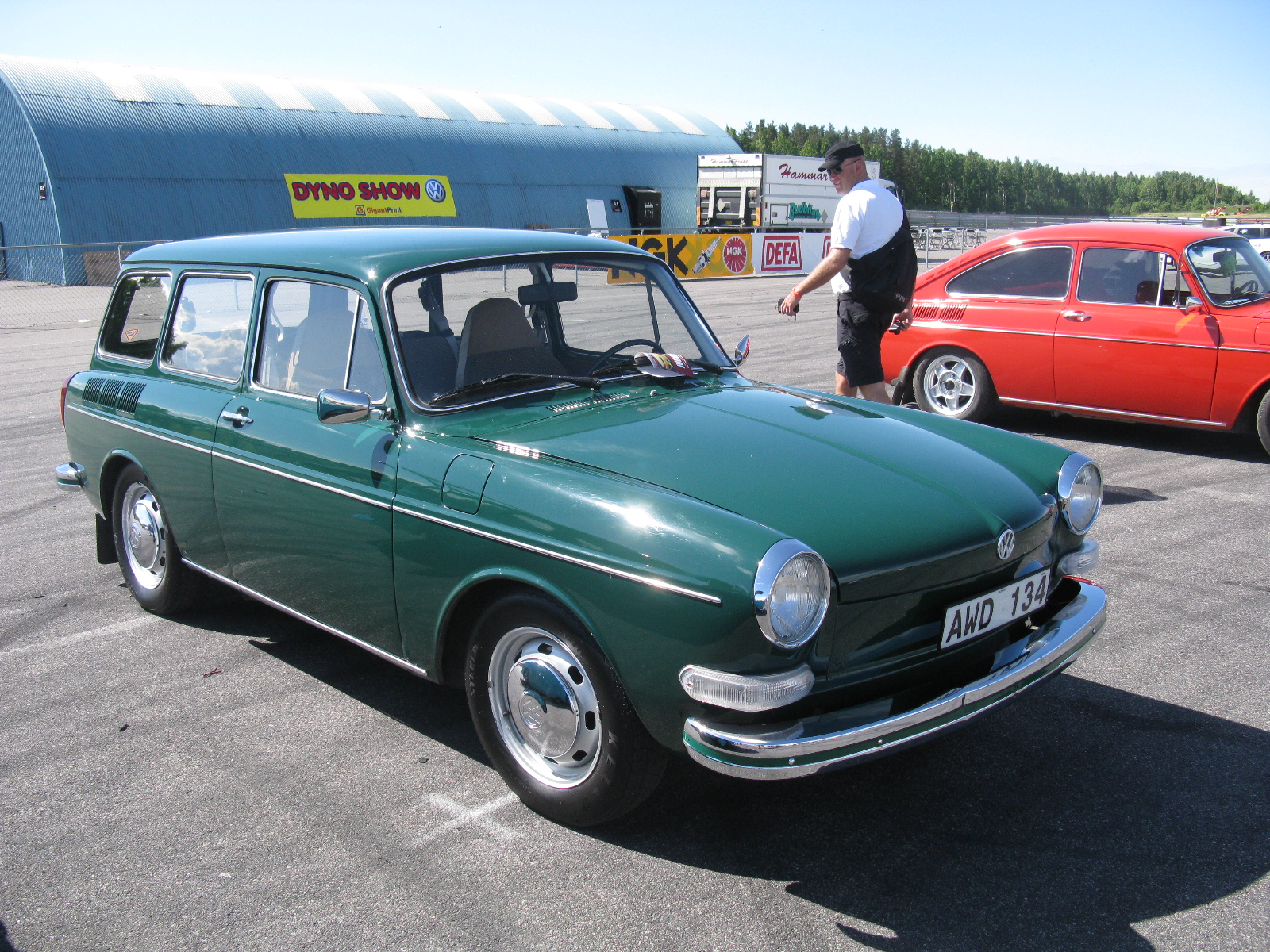 Volkswagen Typ 3 Variant